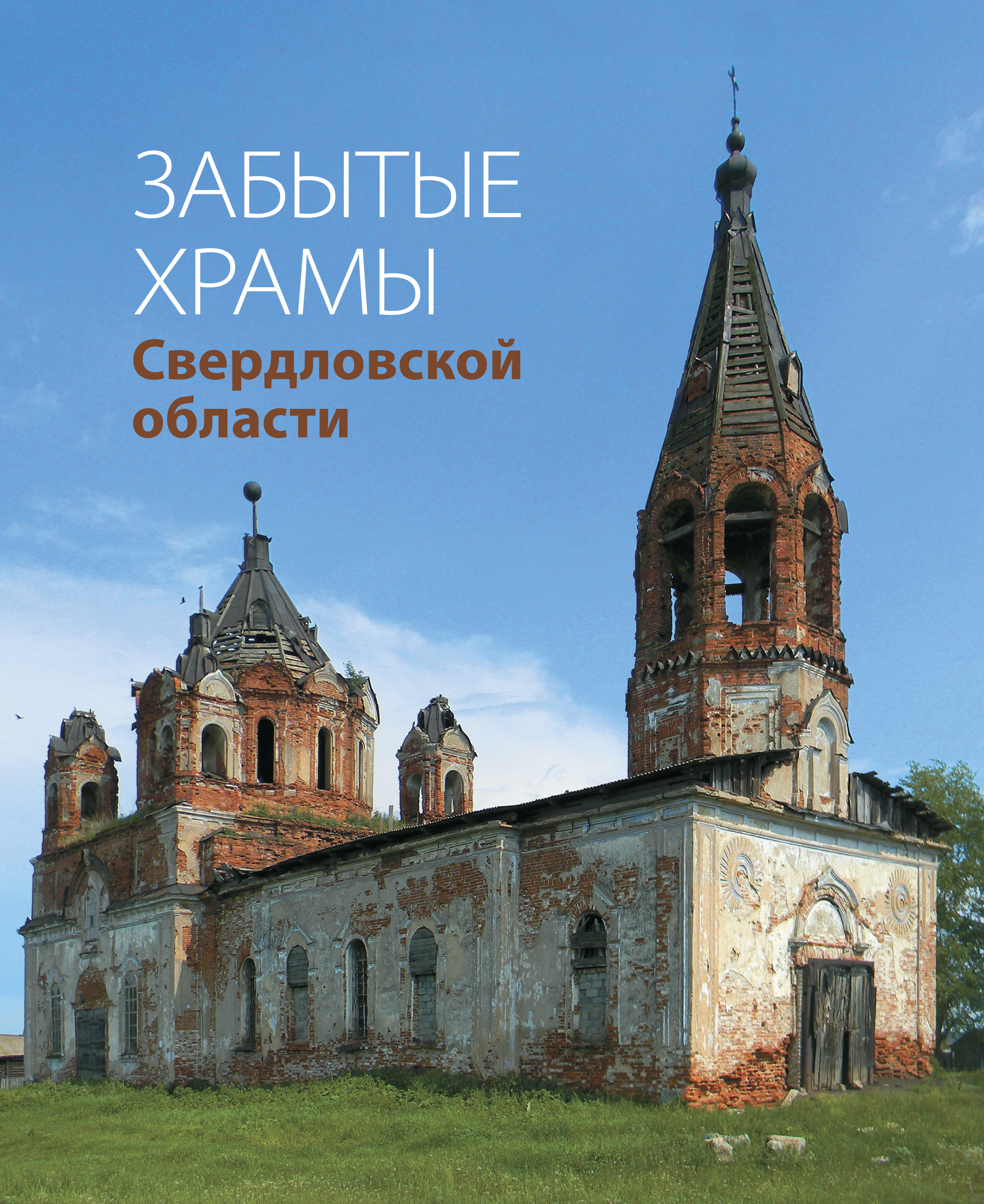 Обложка книги Забытые храмы Свердловской области: на фото -- Троицкая церковь в селе Троицкое, второй по времени храм на Исети